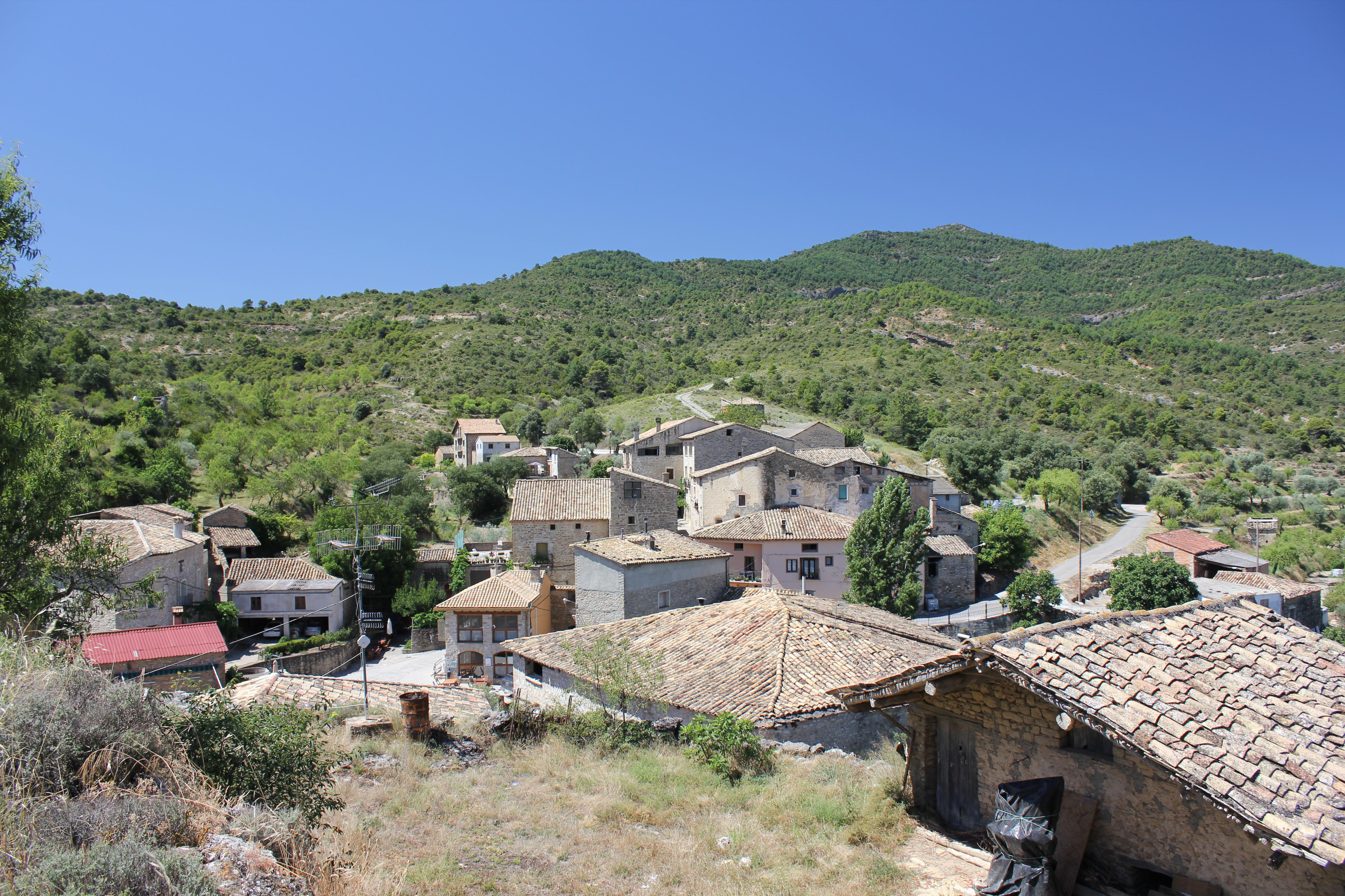 Aragonés: l'Abizanda